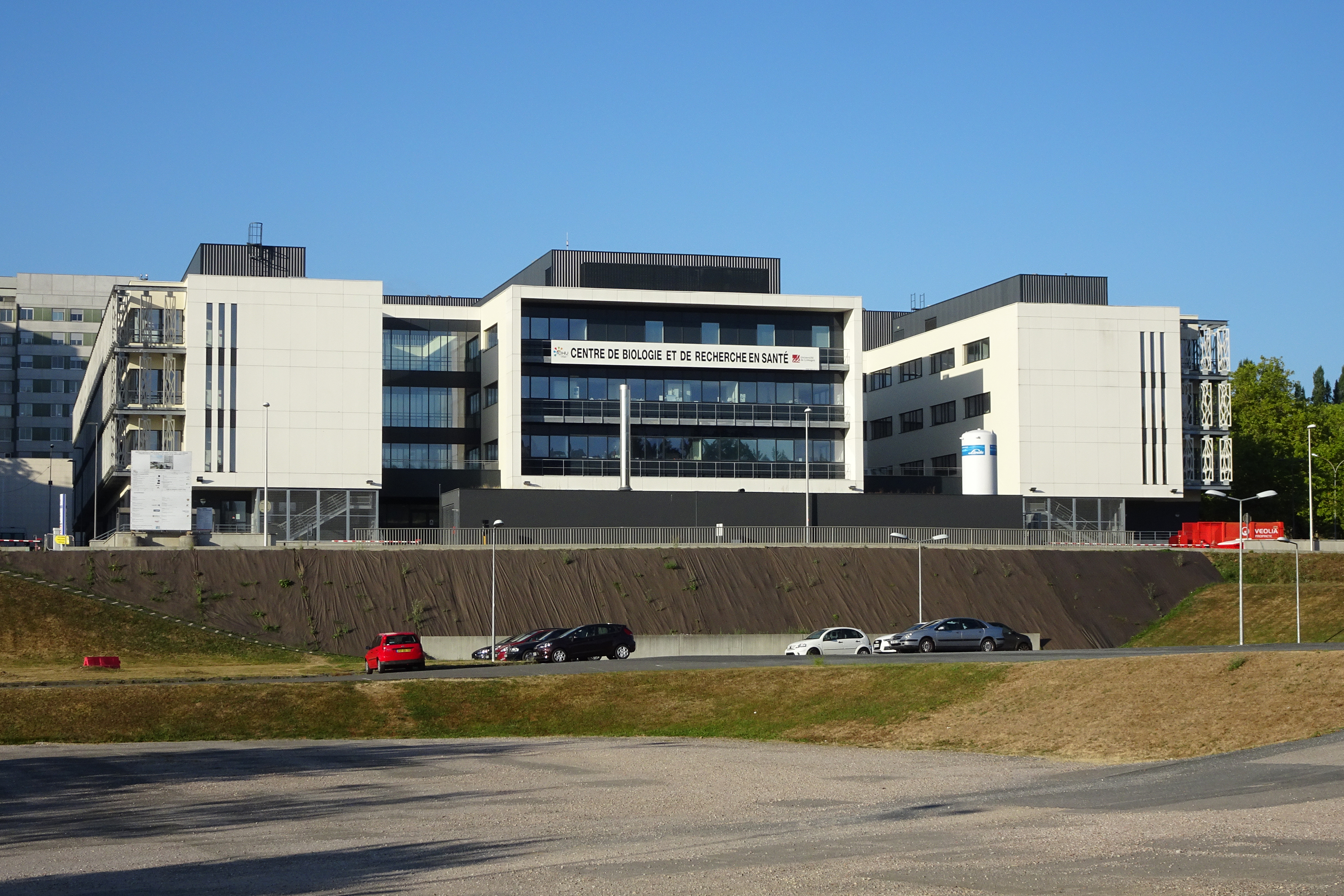 Le Centre de biologie et de recherche en santé (CBRS) du CHU de Limoges